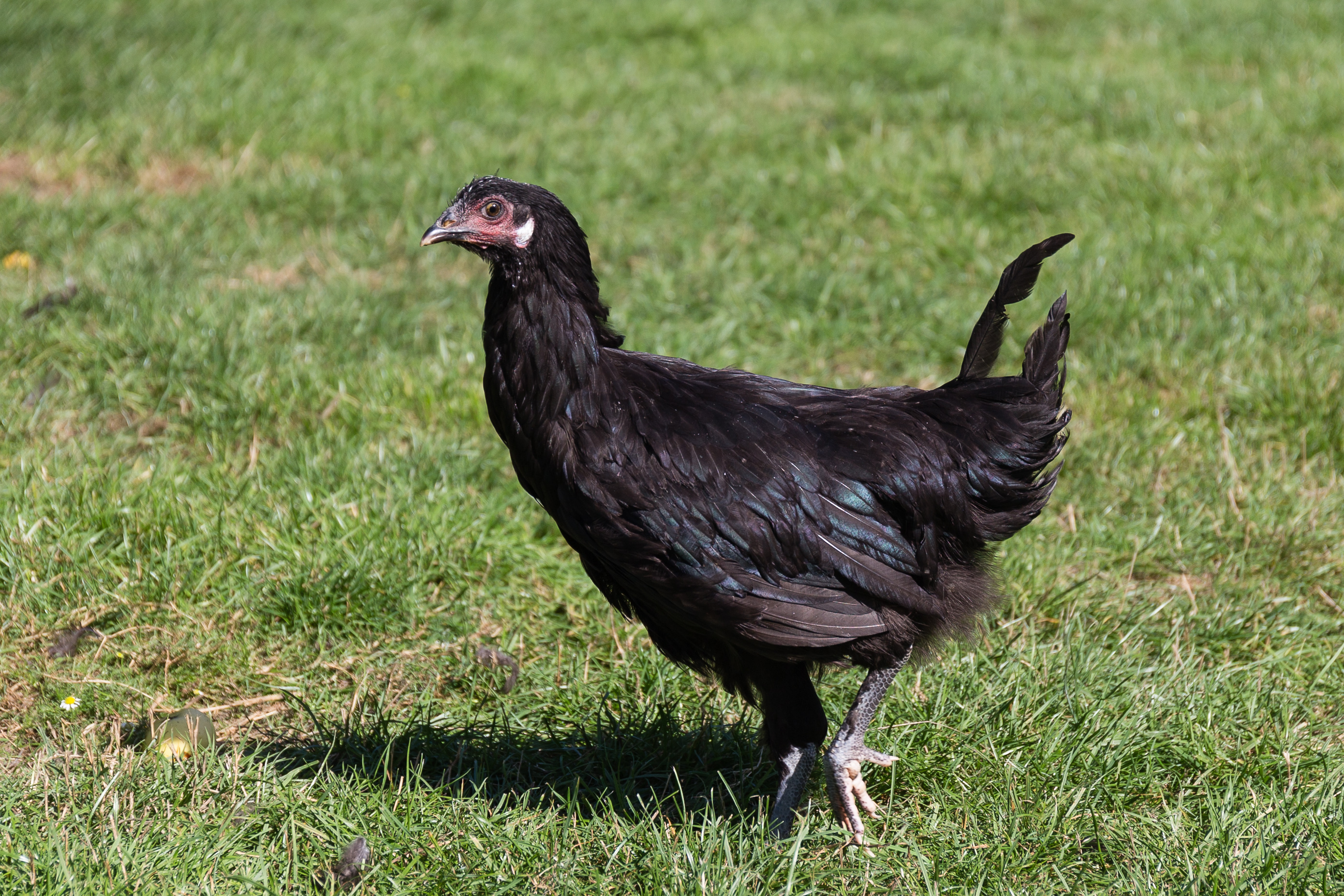 Poule de La Flèche à l'Écomusée du pays de Rennes.